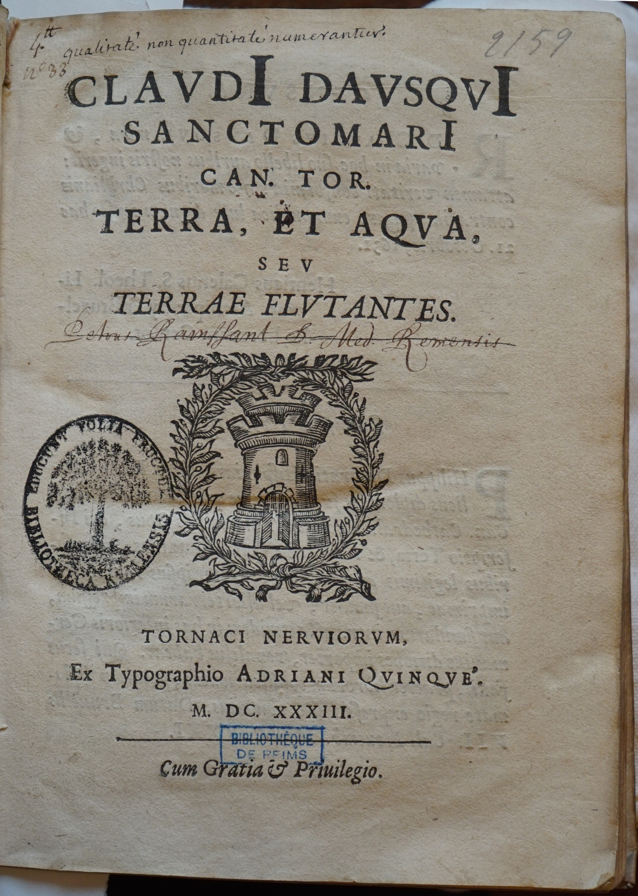 extrait du livre de claude dausque.